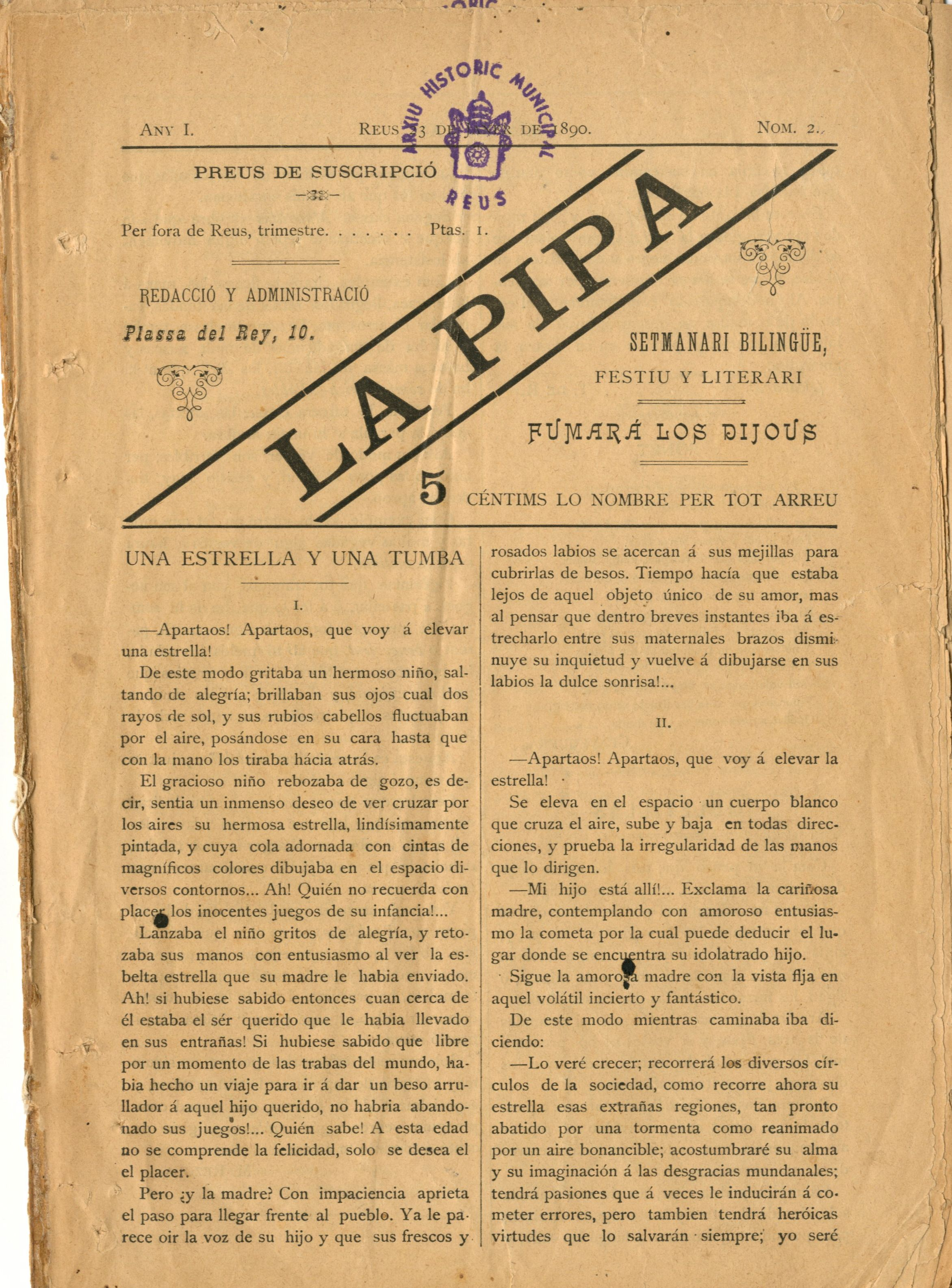 Primera pàgina del número 2 de La Pipa. 1890